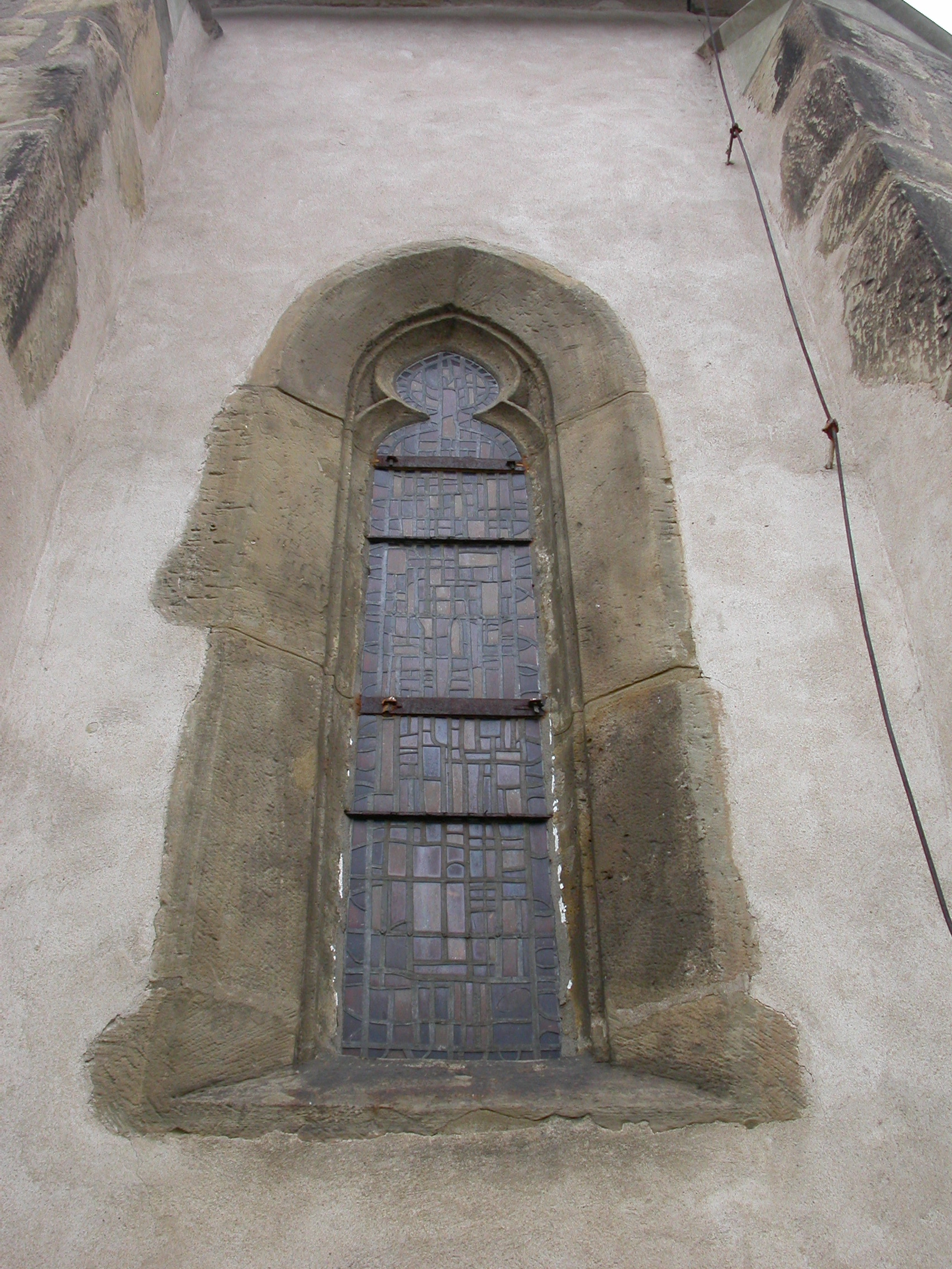 Kostel sv jakuba v libiši detail okna